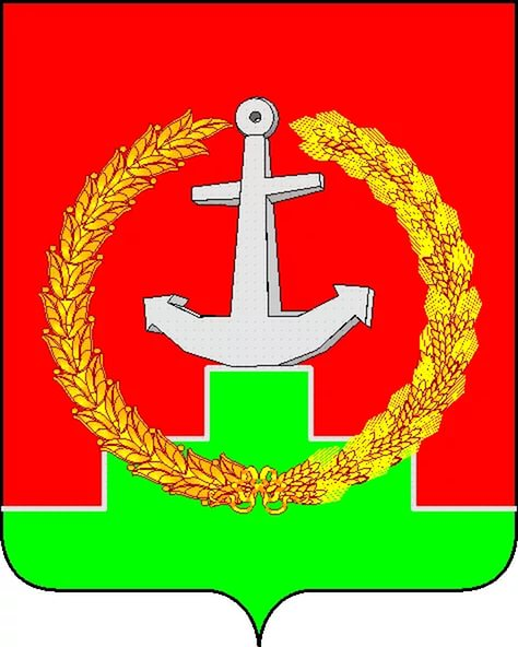 Герб Матвеево-Курганского района